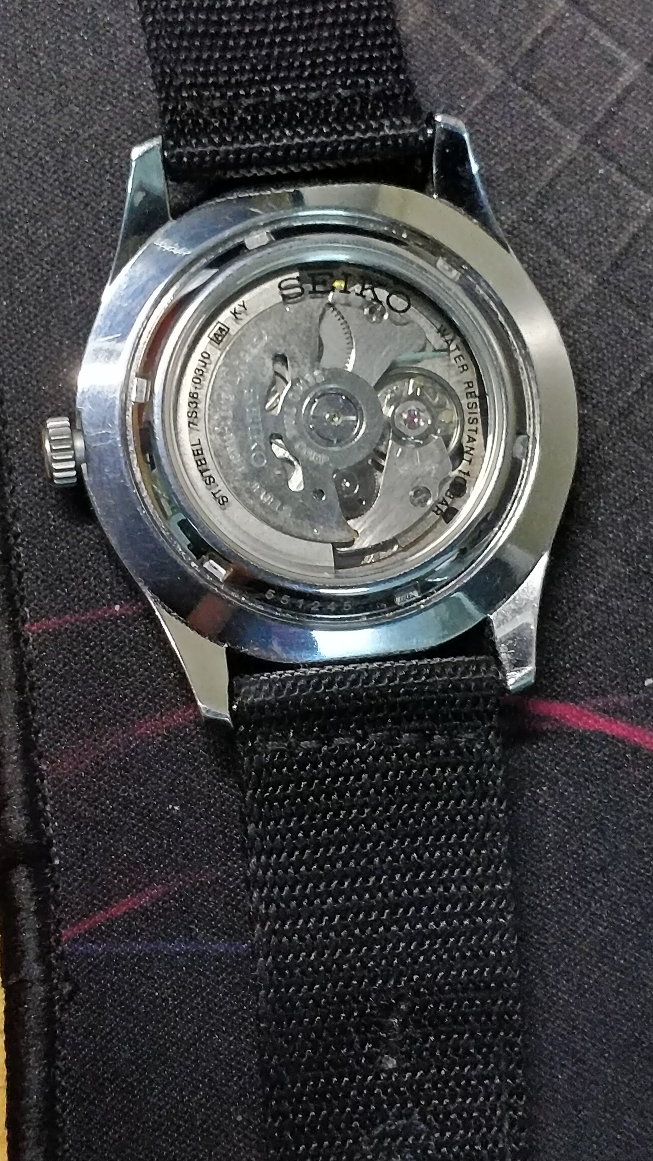 精工五号光明战将系列机械表背部，透过玻璃背盖可清晰地看到手表内部的机械运转